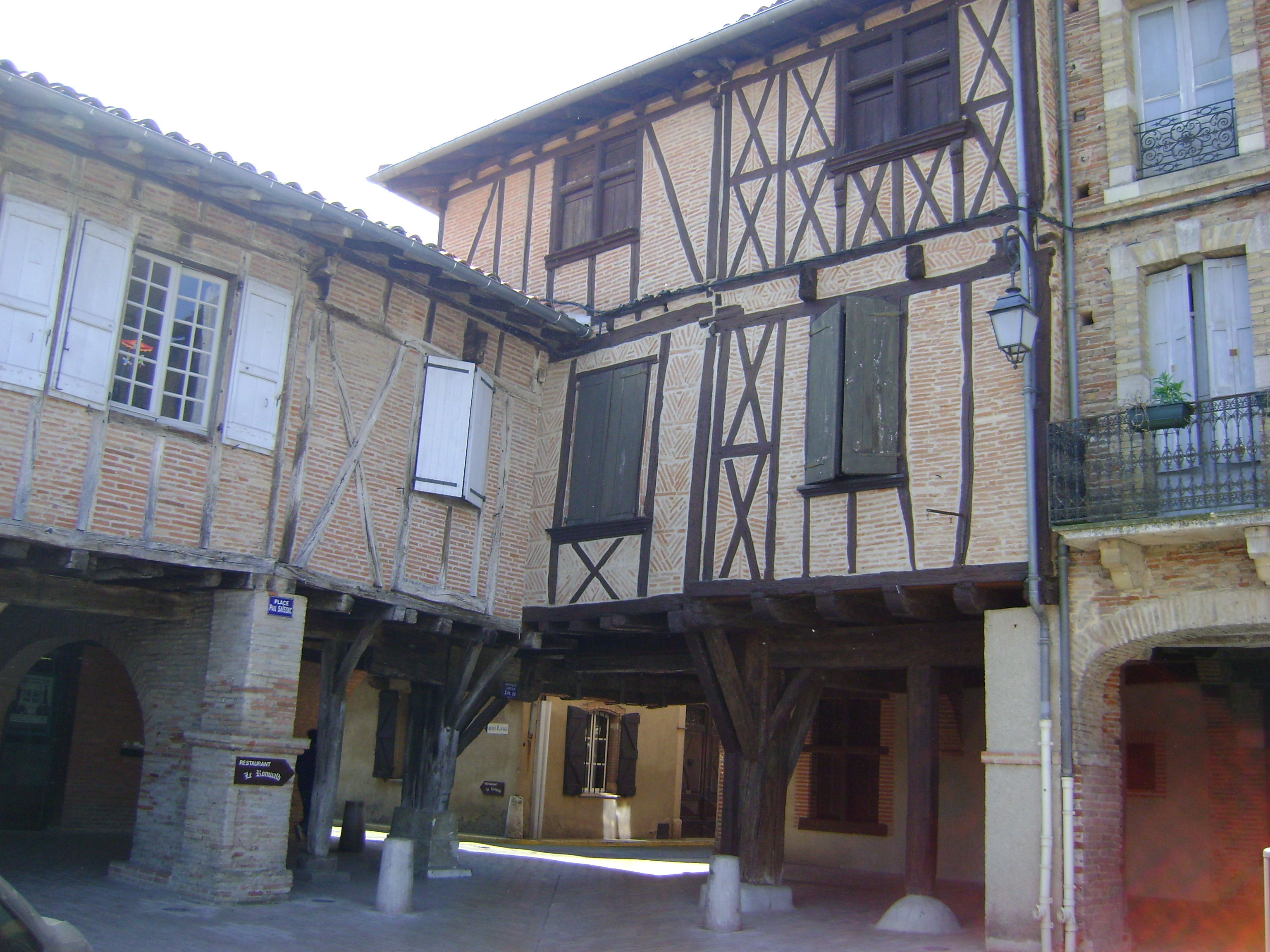 Maison au coin sud de la place Paul Saissac à Lisle sur Tarn, Tarn .